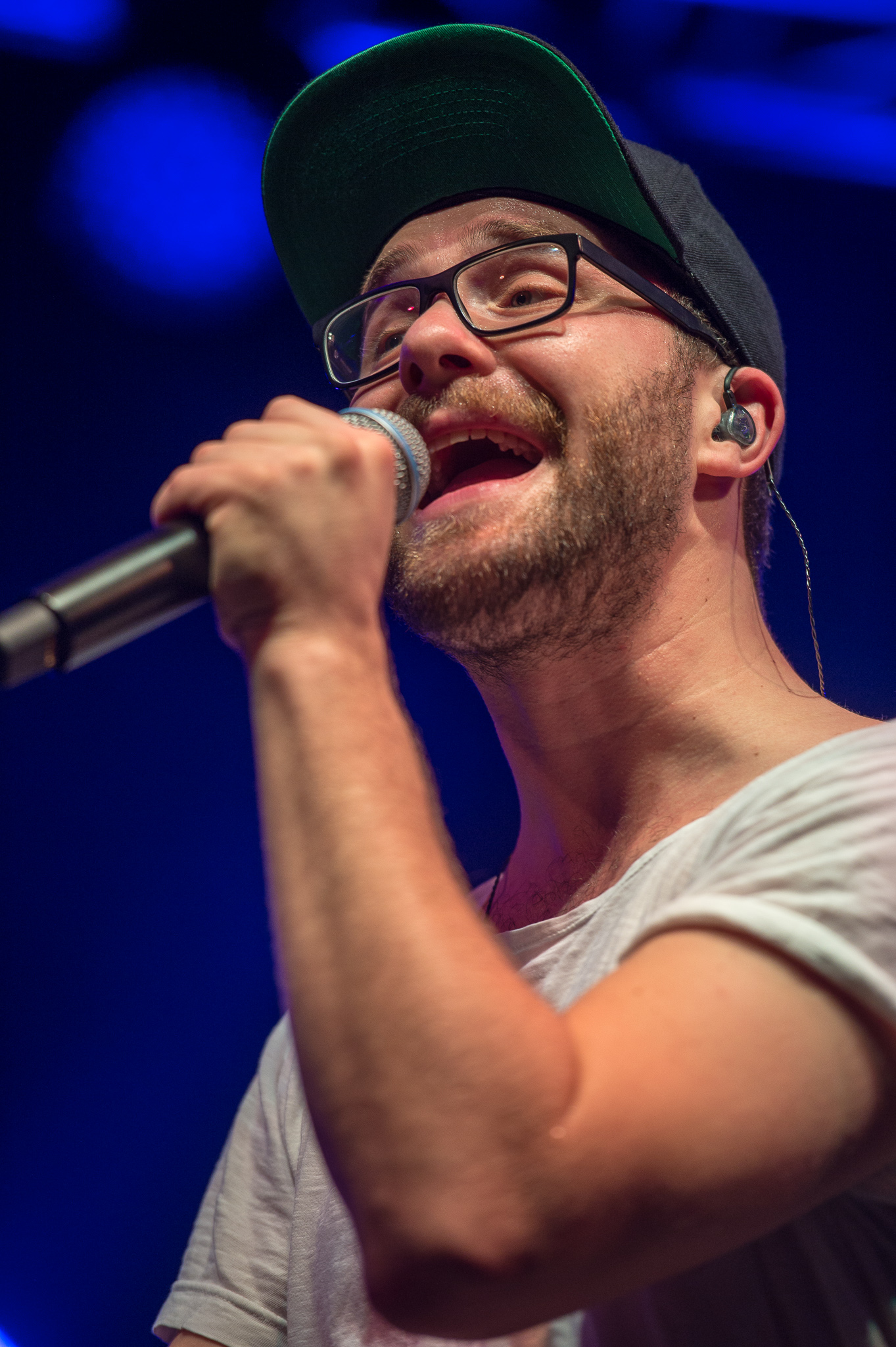 Concertbüro Franken,Konzert,Livekonzert,Livemusik,Löwensaal,Mark Forster,Musik